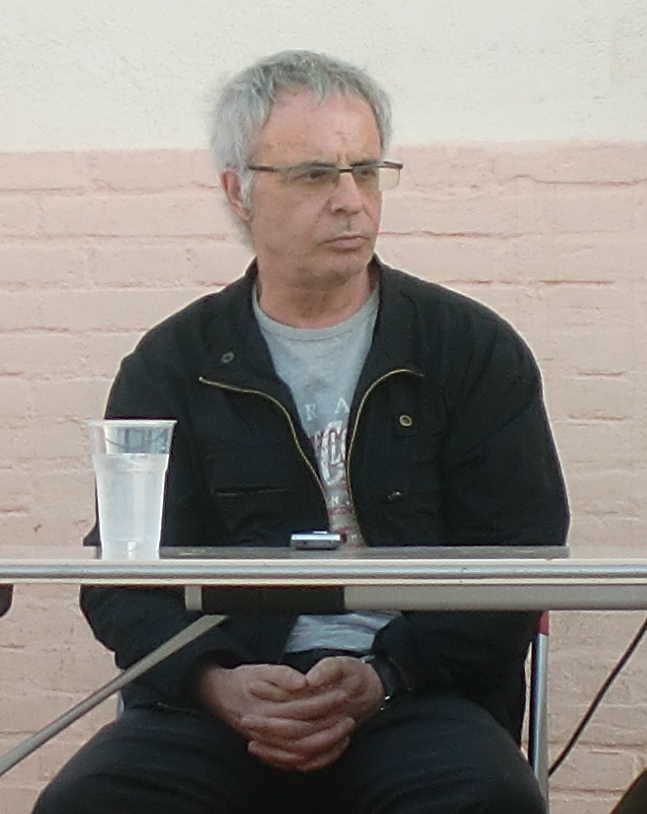 Ferran Torrent presentant la novel·la Ombres en la nit al Casal Jove l'Escorxador de Godella el 14 de juny de 2012.